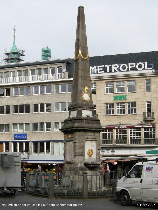 Maximilian-Friedrich-Obelisk auf dem Bonner Marktplatz